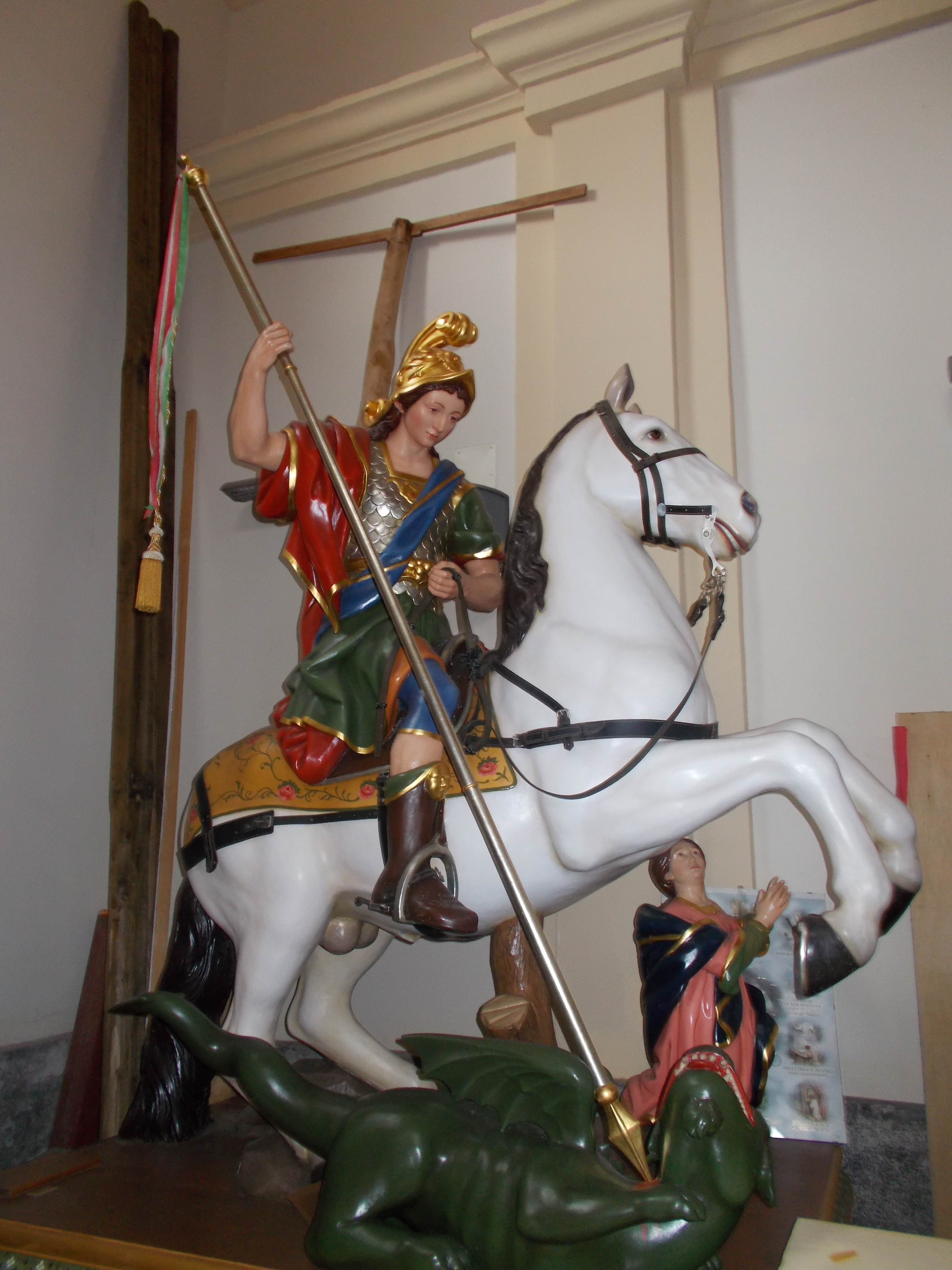 Statua di San Giorgi, di Domenico De Lorenzo, Chiesa Matrice di Maropati (R.C.).